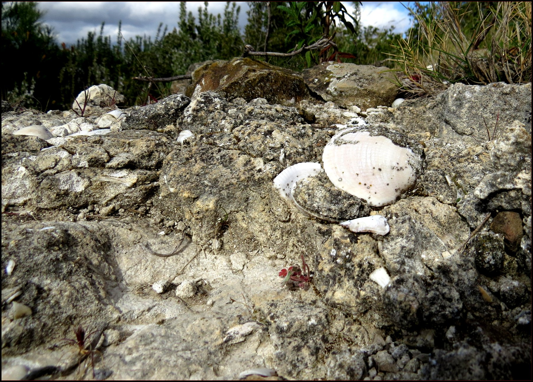 Valves de Lamellibranches (Tapes) incluses en totalité dans le mortier d'un faîte de mur. Villa romaine de Fount de Rome, Fleury d' Aude, Occitanie